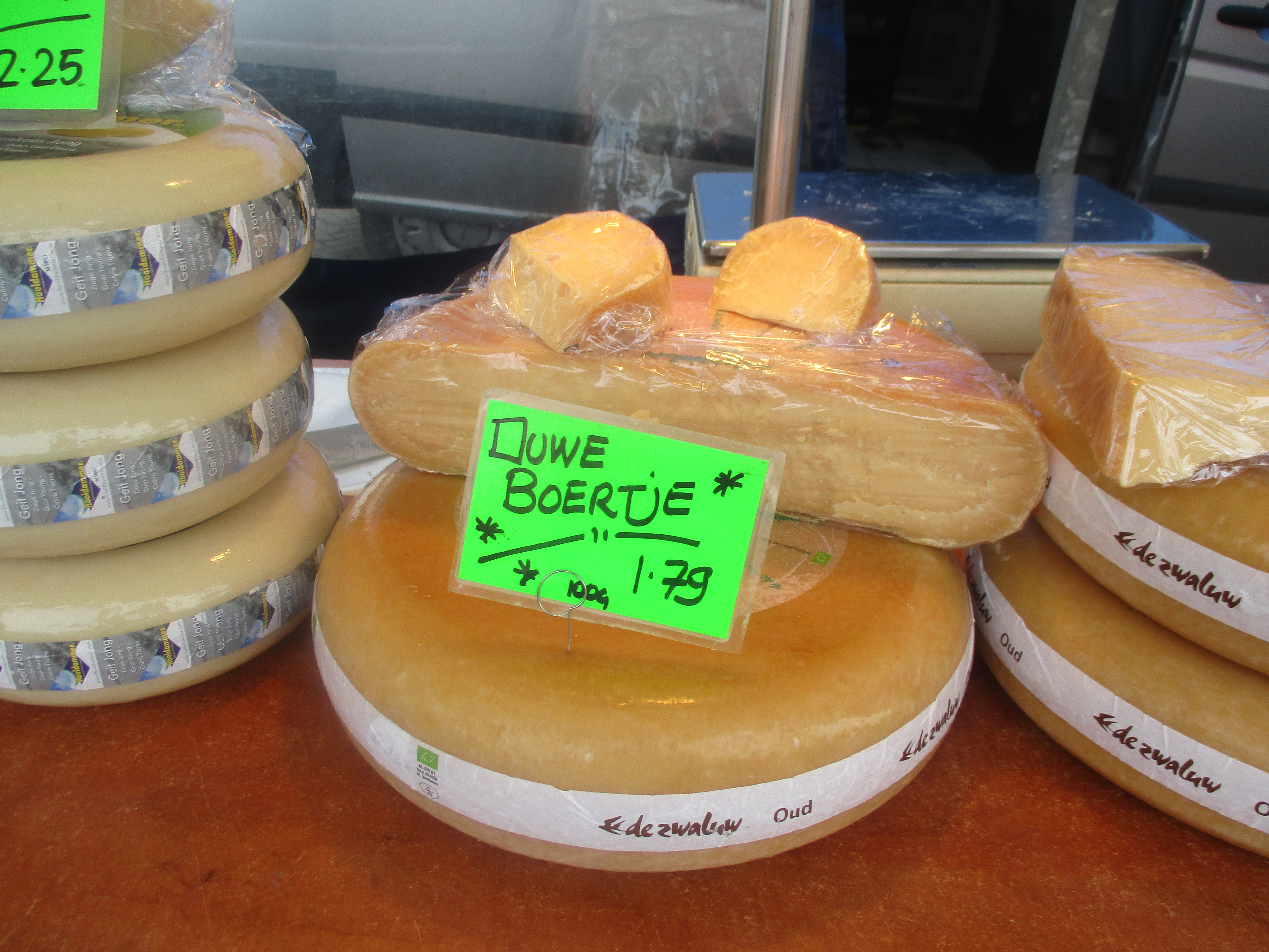 Fromage hollandais type vieux fermier, type gouda.